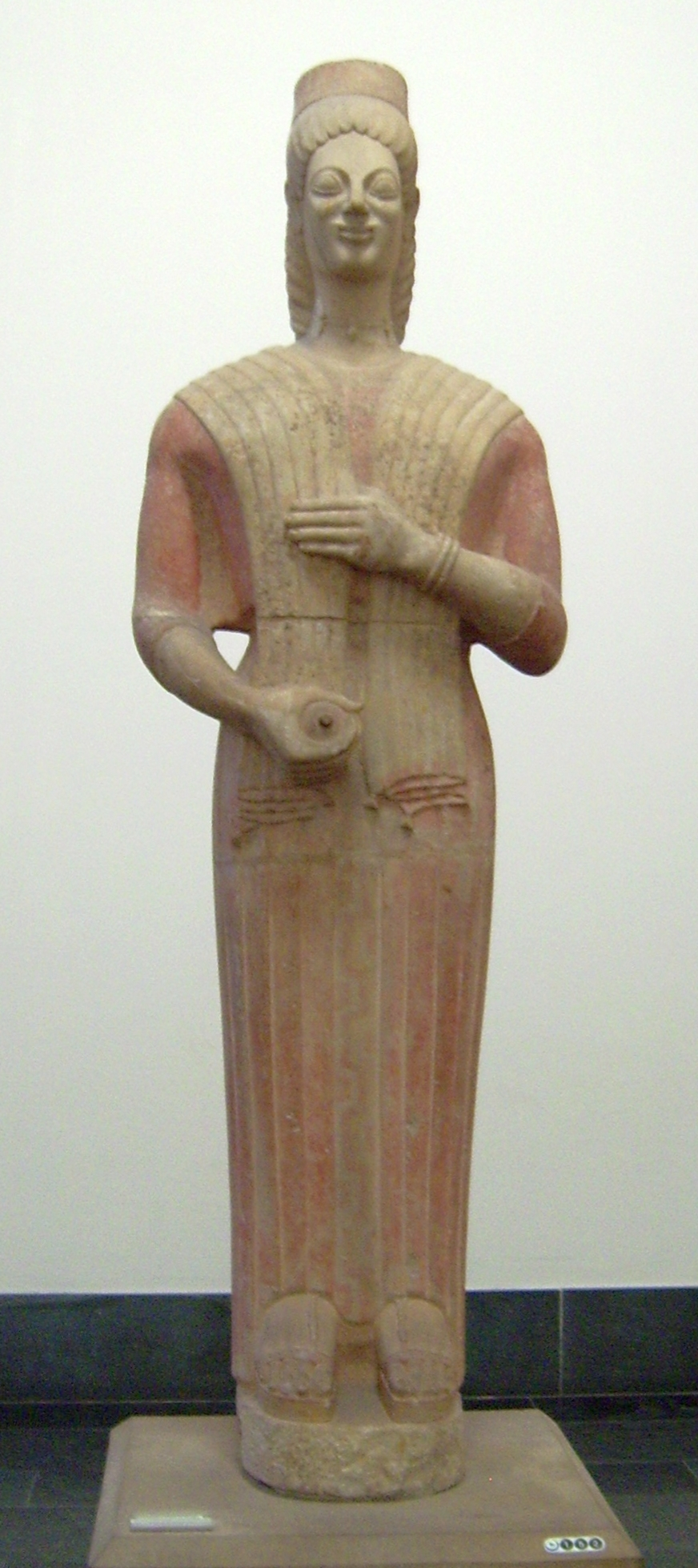 Statue der sogenannten Berliner Göttin, attisch, zwischen 580 und 560 v. Chr., Marmor, Höhe 193 cm, mit Restbemahlung, Antikensammlung Berlin (Sk 1800)